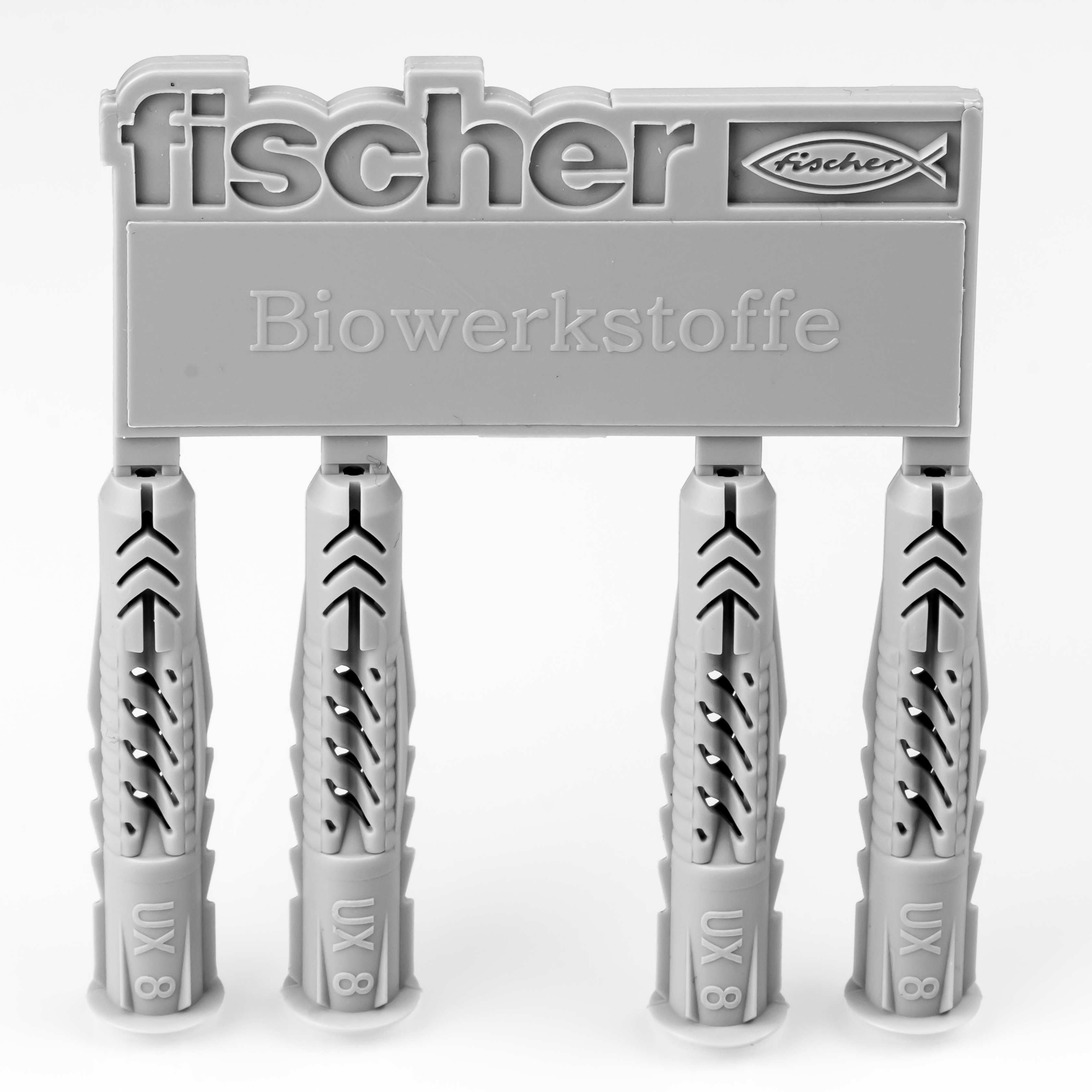 fischer Universaldübel UX 8 aus Biowerkstoff (grau)